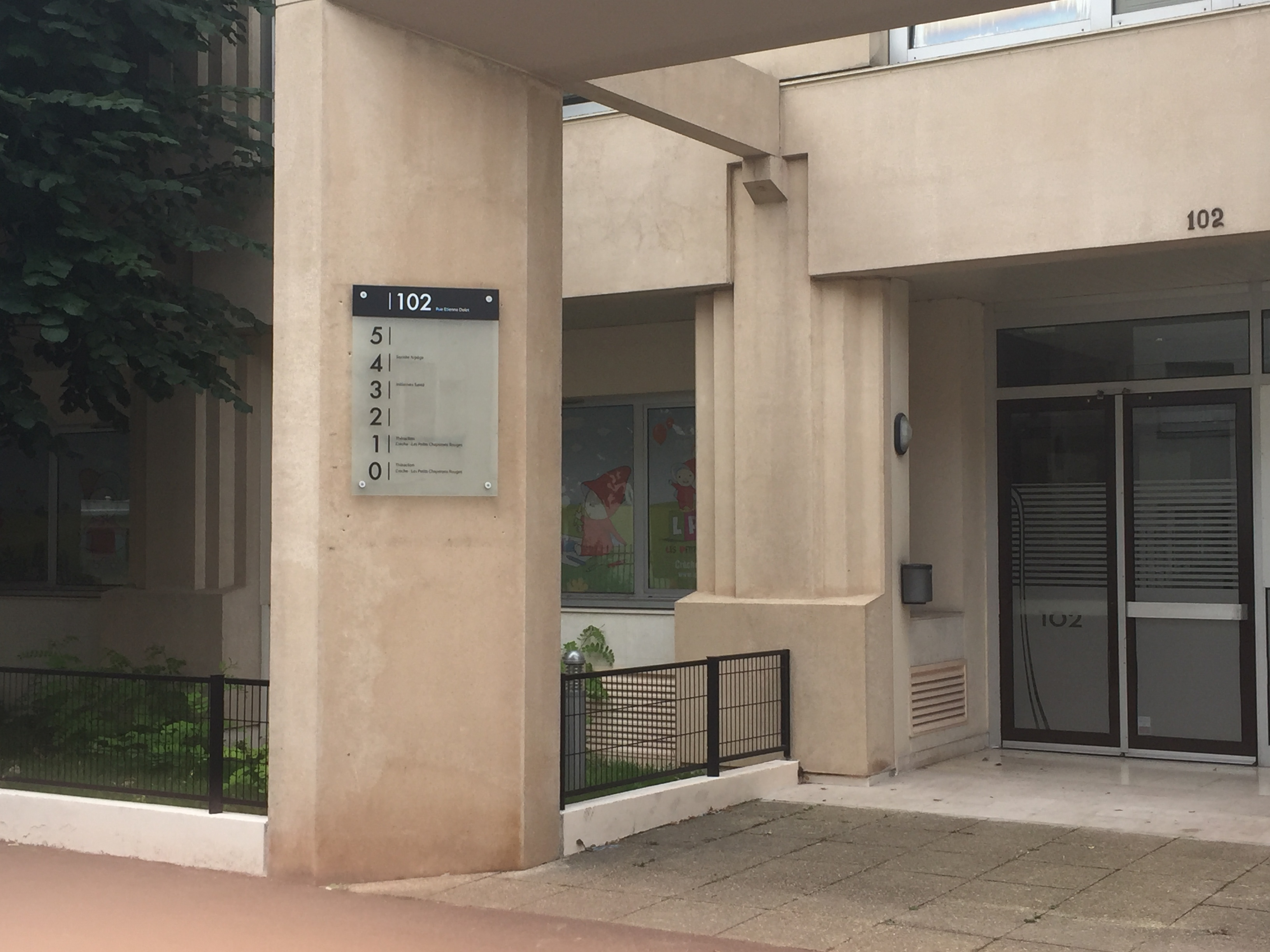 102 rue etienne dolet